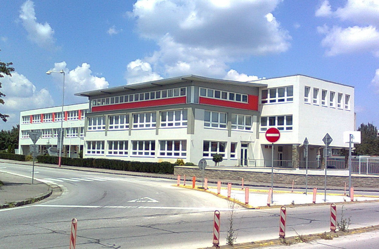 administratívne centrum Pro CS